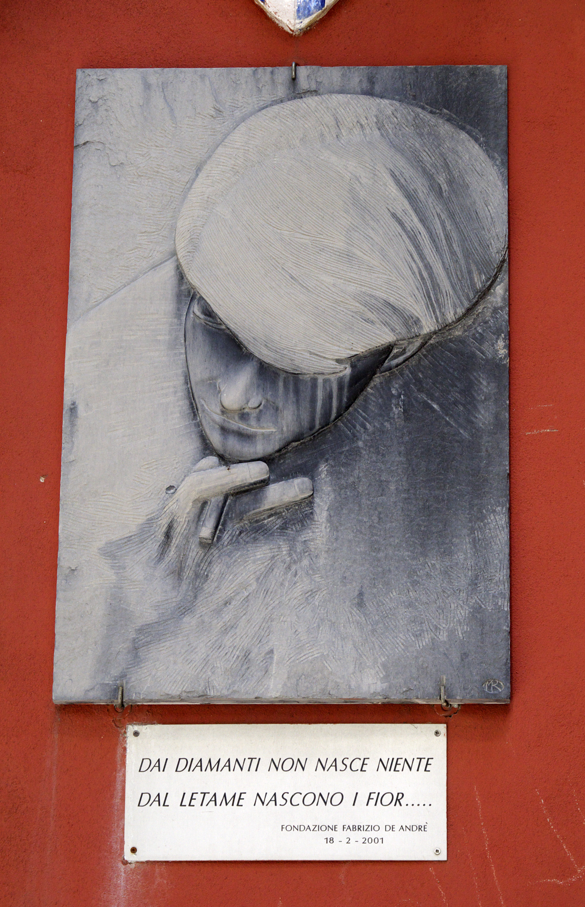 Via del Campo 29r – Emporio museo musicale This is a photo of a monument which is part of cultural heritage of Italy.